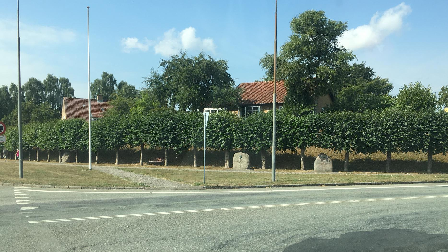 Mindestenene ved krydset Slotsbakken/Felstedvej i Gråsten